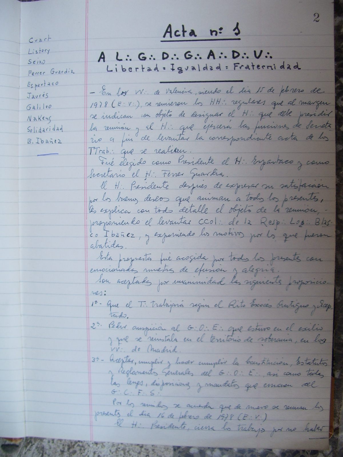 Acta constitutiva 1978